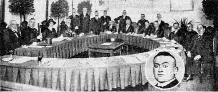 burgemeester van Hoogeveen is geïnstalleerd Mr. J. L. Bouma. Een plaatje tijdens de plechtigheid genomen; met X gemerkt de burgemeester, naast hem zijn echtgenoote